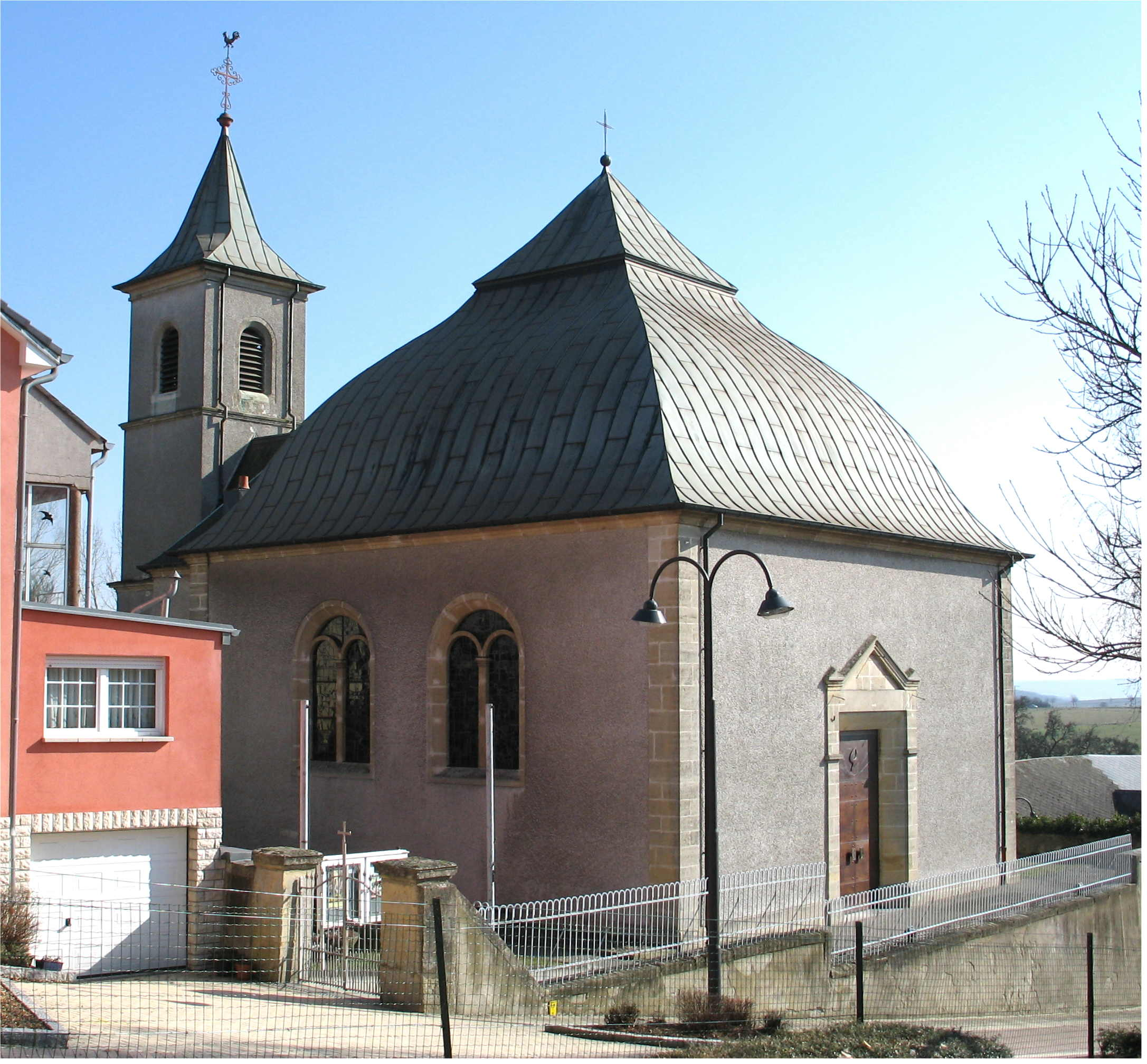 Sujet : D'Kierch zu Dippech Source : Eege Foto lb: :lb :User : Johnny Chicago Lizenz : GFDL